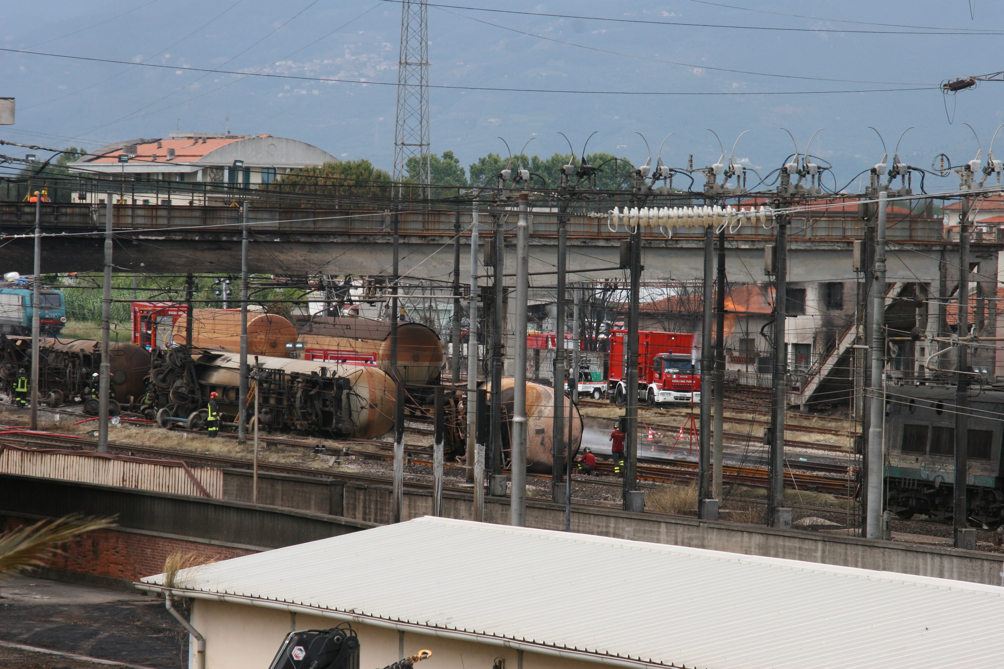 Viareggio train accident